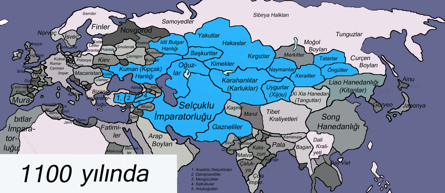 Kaynak: Haritanın büyük bir kısmı Thomas Lessmann'nin izini ile kendi ürettiği Tarihi dünya haritaları'ndan alınmıştır. Ayrıca Jean-Paul Roux'un Türklerin Tarihi (ISBN 975-997-091-0) adlı kitabındaki tariflerine göre ve Büyük Tarih Atlası (Arkın Kitabevi ISBN 975-402-012-4) ile bazı düzeltmeler ve ilaveler yapılmıştır.